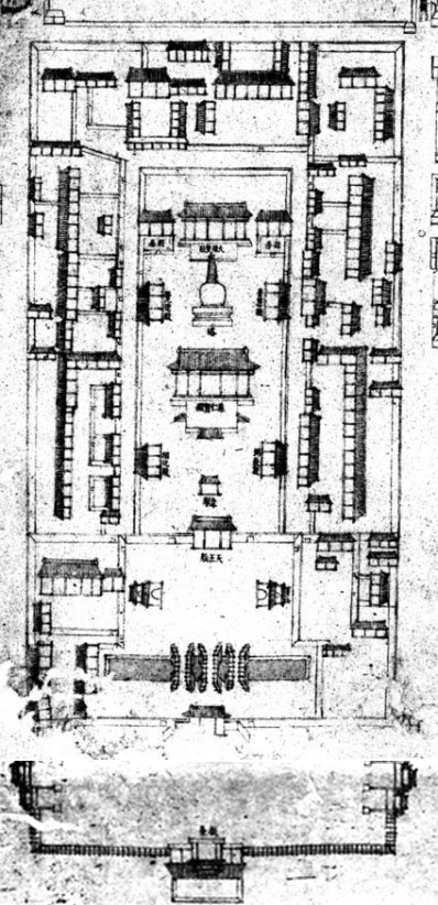 乾隆十五年（1750年）完成的《乾隆京城全图》中的宏仁寺（弘仁寺）。本图来自清內務府藏京城全圖，故宮博物院影印，民國二十九年十二月（1940年）。由于该寺前的戏楼及牌楼在此次影印出版时和寺院位于不同页，所以本图为本人拼接而成，拼接时难免有差错，请自行查阅原图校对。